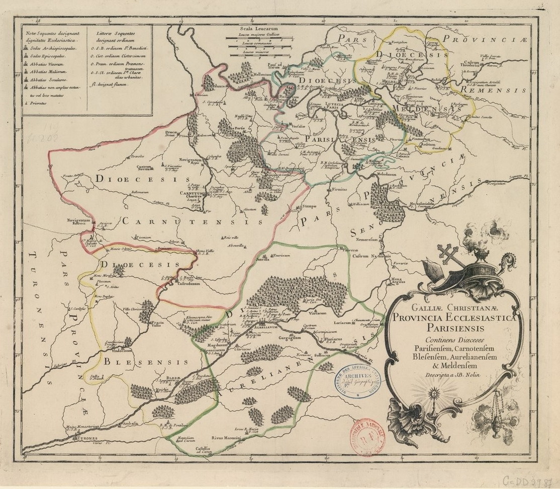 Carte de l'ancienne province ecclésiastique de Paris, insérée dans la Gallia Christiana (1715/1759).